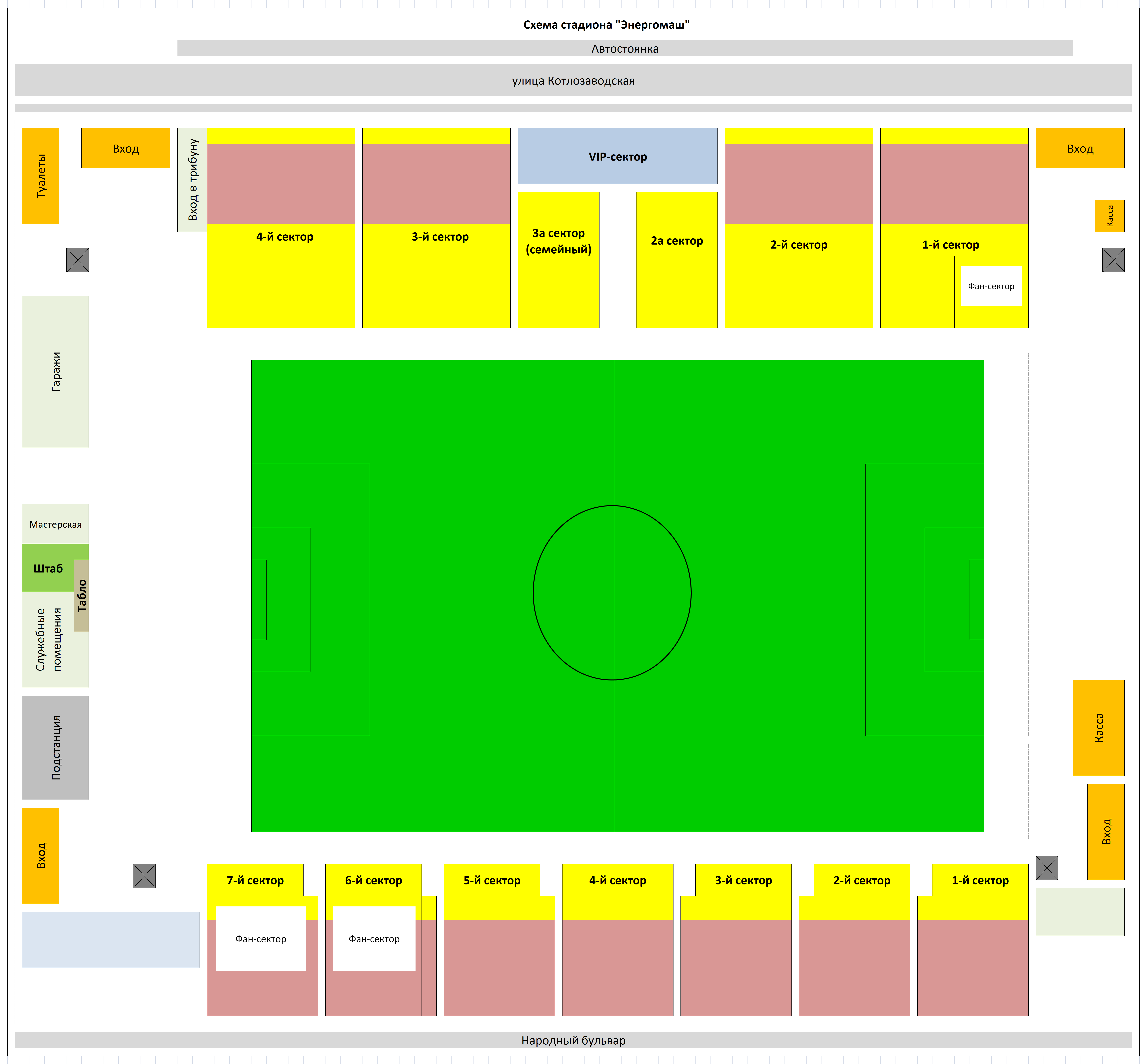 Схема стадиона "Энергомаш" в Белгороде